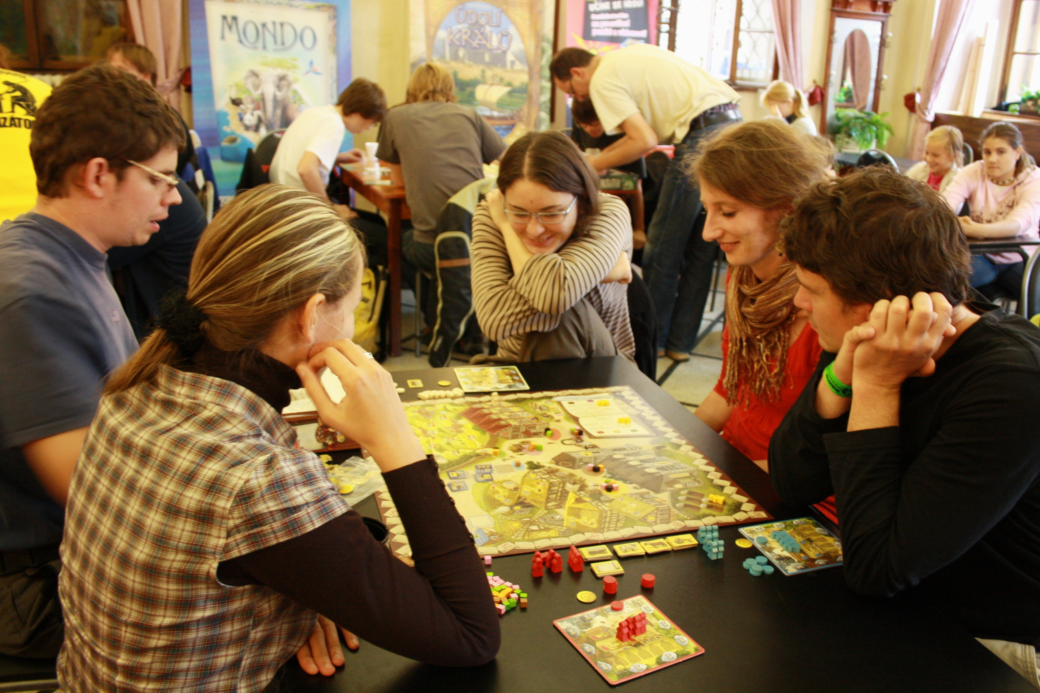 Deskohraní 2012 - Kronika panství